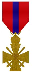 Oorlogskruis